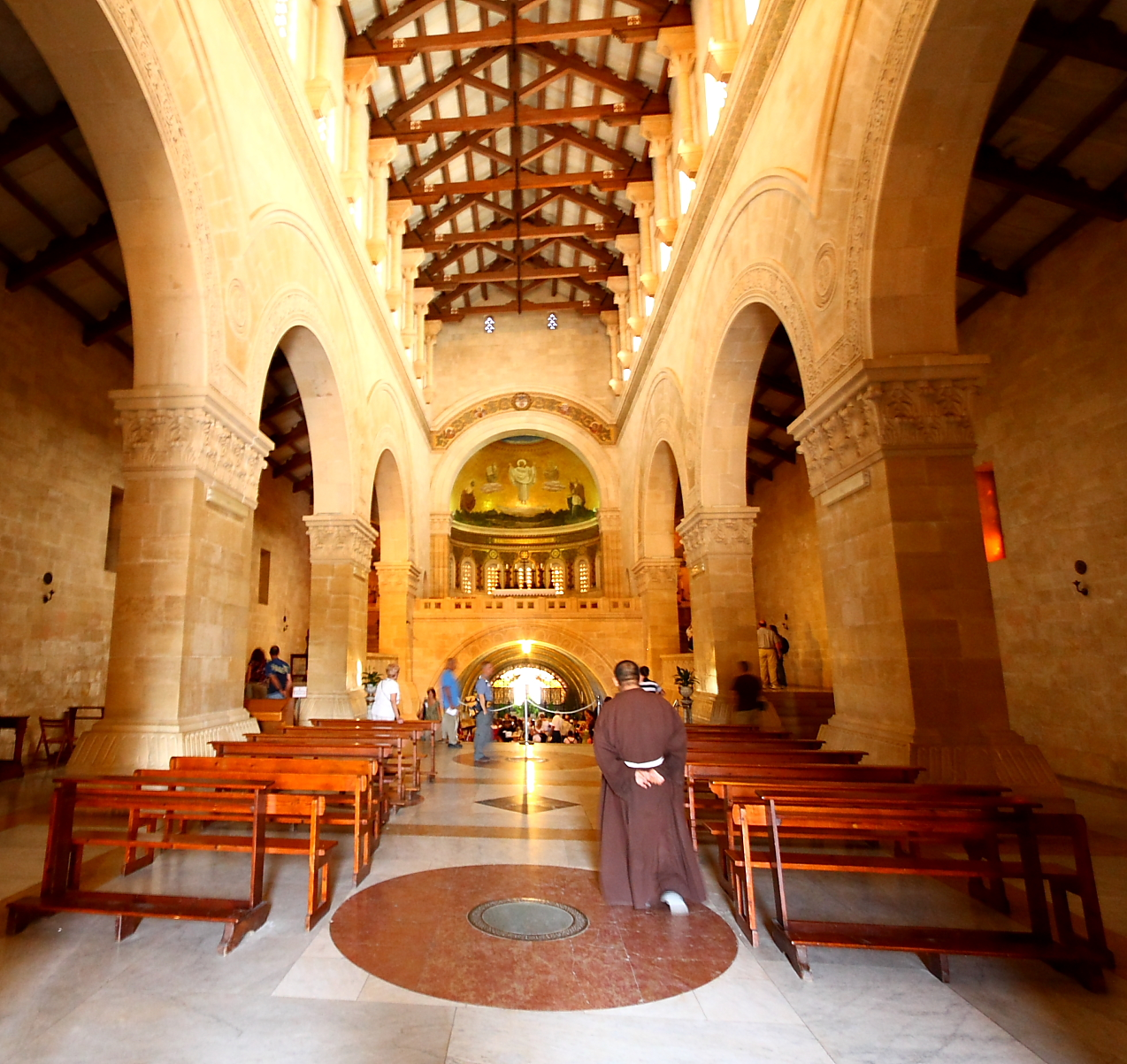 Интерьер католической базилики на горе Фавор, Израиль.